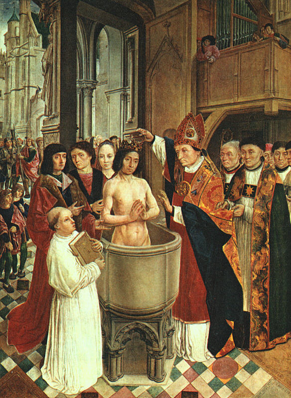 Ce panneau est l'un des quatre éléments conservés du retable peint pour l'église Saint-Leu-Saint-Gilles de Paris